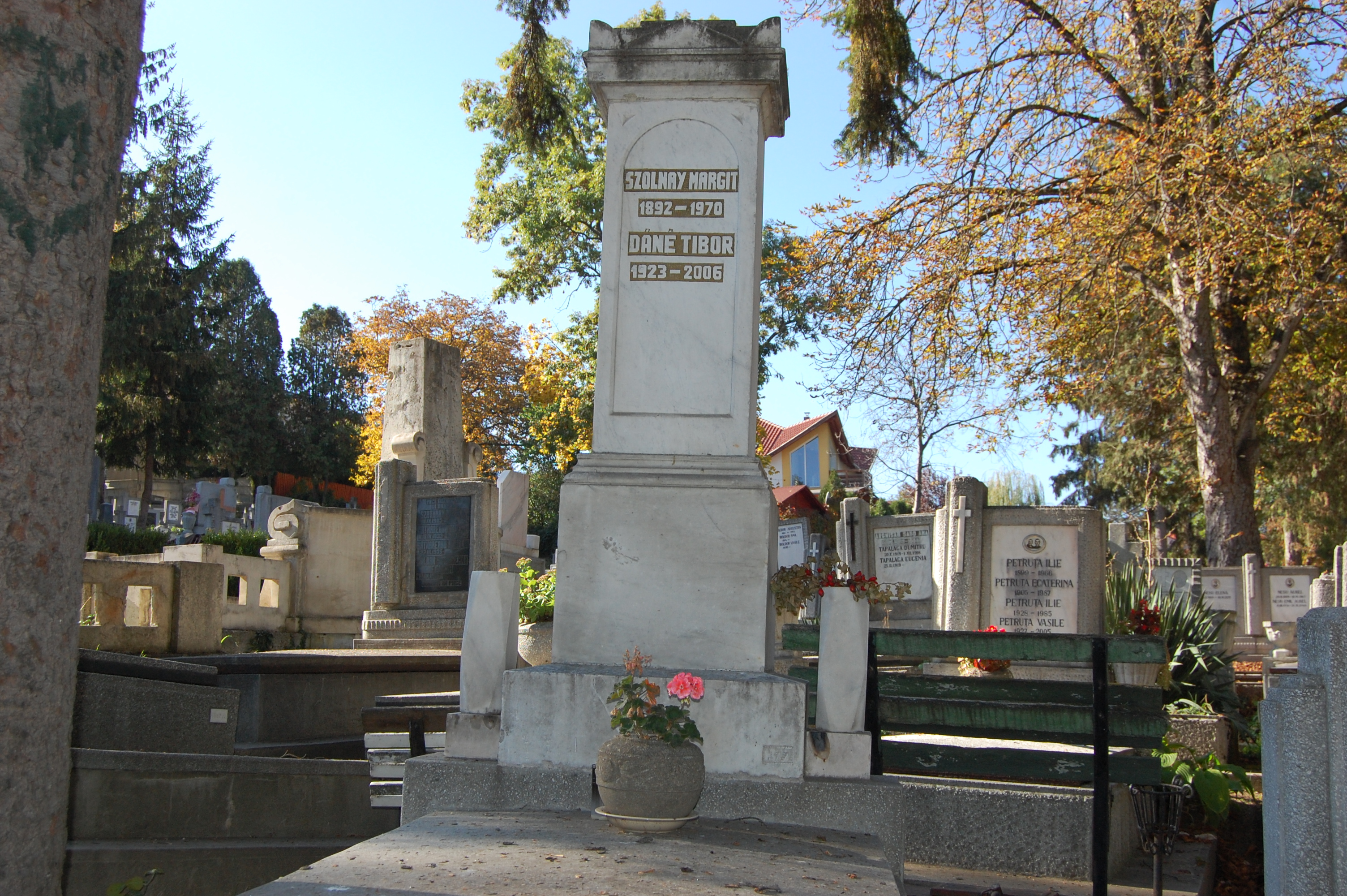 Dáné Tibor író, szerkesztő sírja a kolozsvári Házsongárdi temetőben